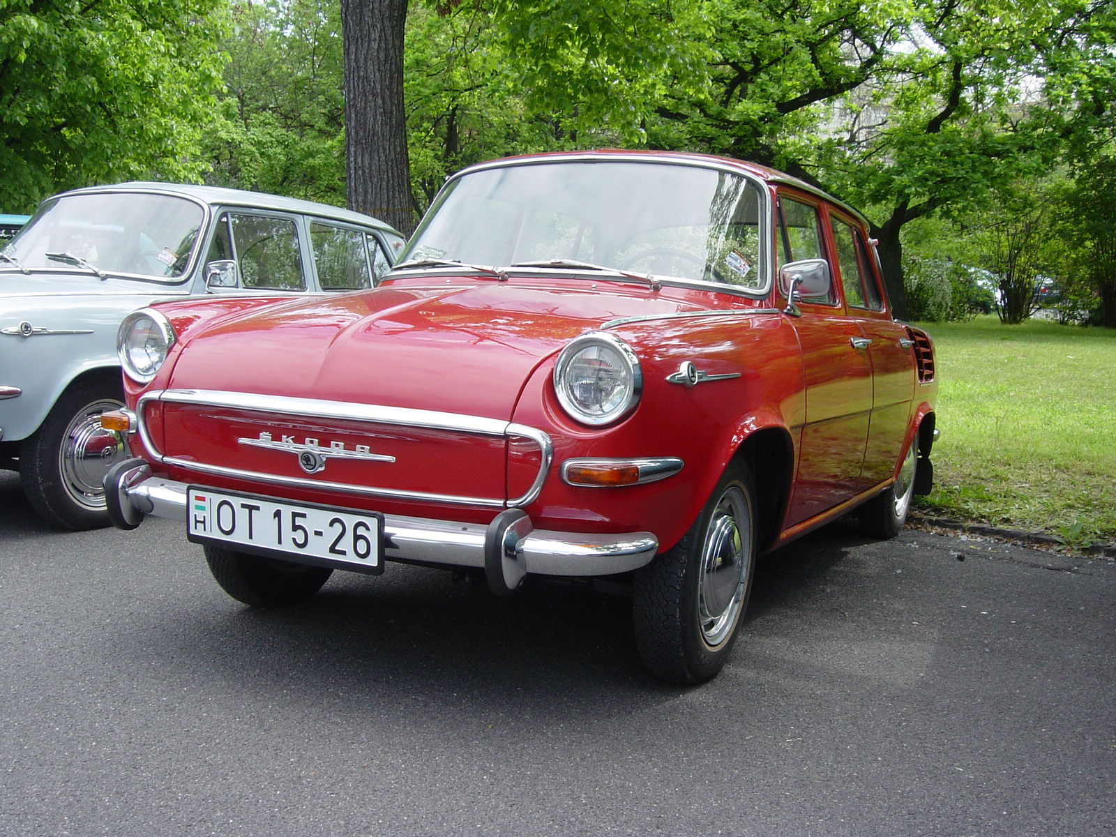 Red Škoda 1000 MB at the Szocialista Jáműipar Gyöngyszemei 2008.